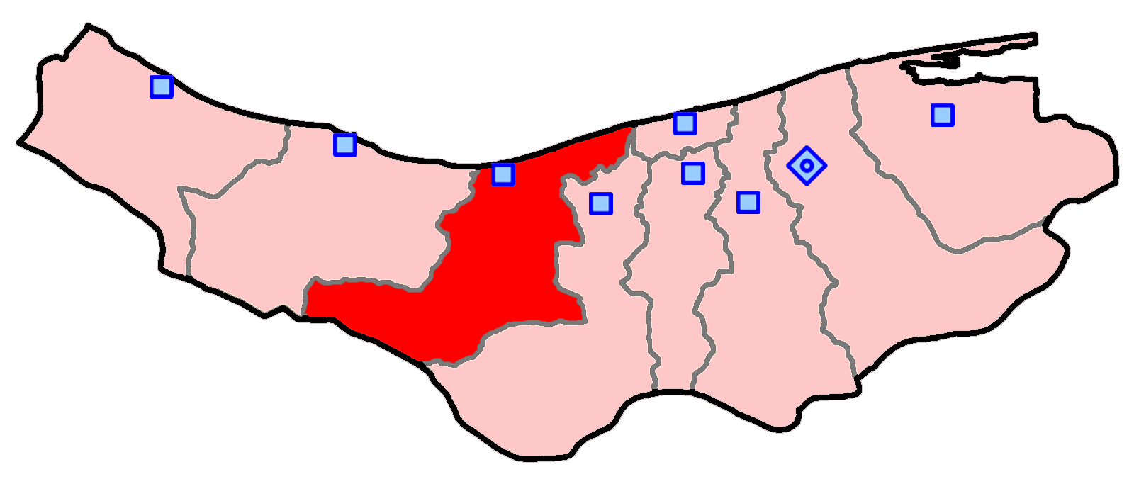 حوزهٔ انتخاباتی نور و محمودآباد برای انتخابات مجلس شورای اسلامی